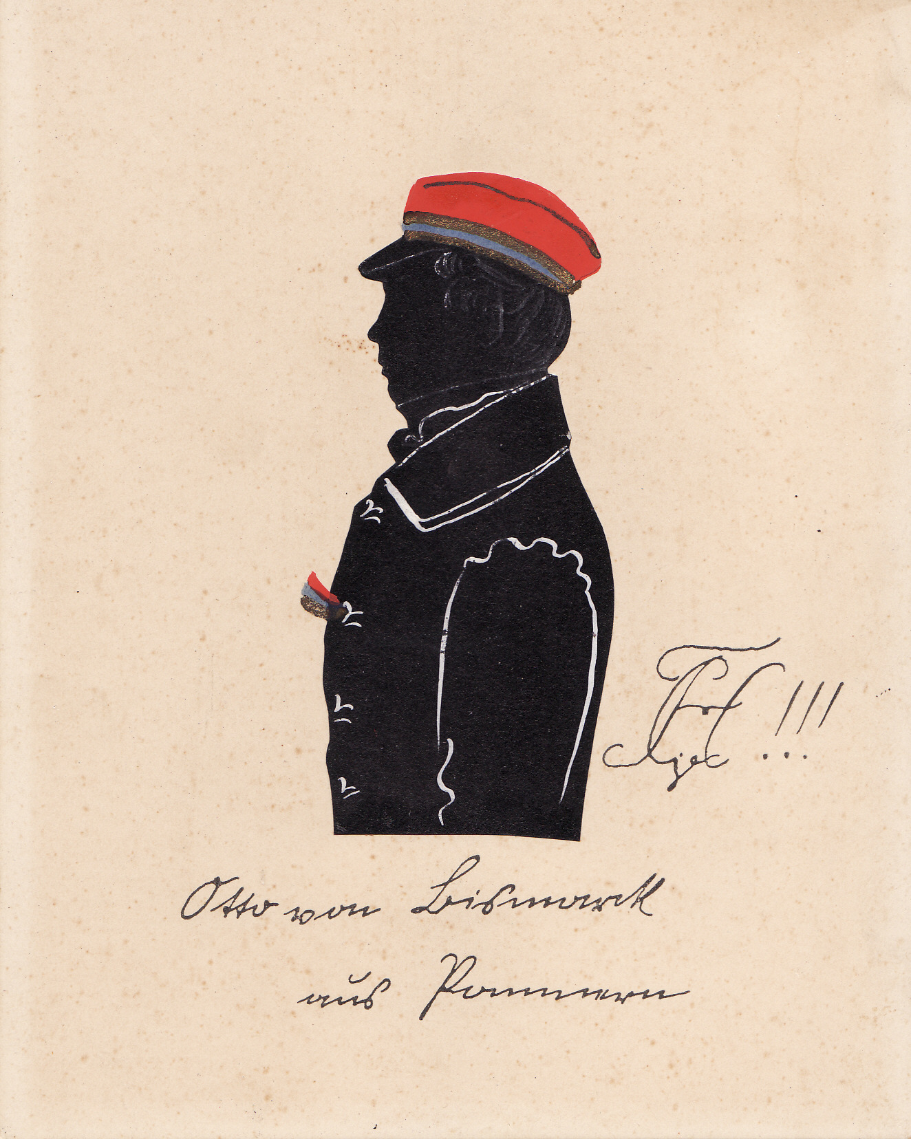 Otto von Bismarck als Student in Couleur seines Corps Hannovera Göttingen. Reproduktion des zeitgenössischen Scherenschnitts von 1832 im Besitz des Corps Hannovera. Anderweitige Abbildung zB [1]